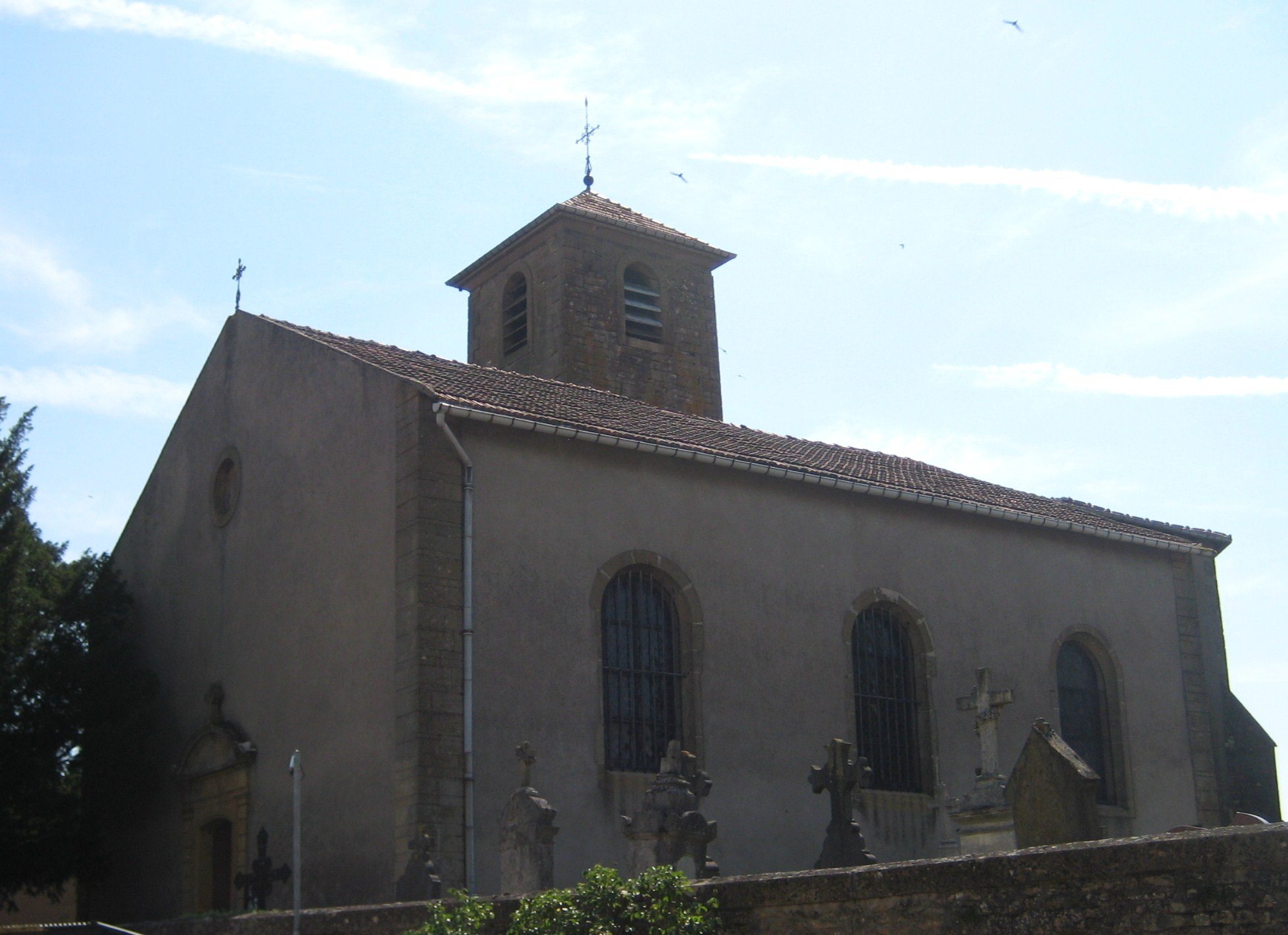 Description Église paroissiale de la Très-Sainte-Trinité-de-Génaville, commune Les BarochesDate 26 June 2009Source mon appareil photoAuthor Aimelaime Église paroissiale de la Très-Sainte-Trinité-de-Génaville, commune Les Baroches